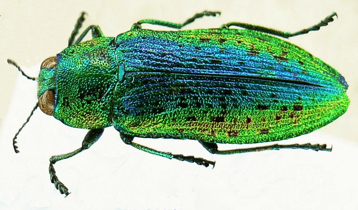 Ovalisia (Scintillatrix) rutilans